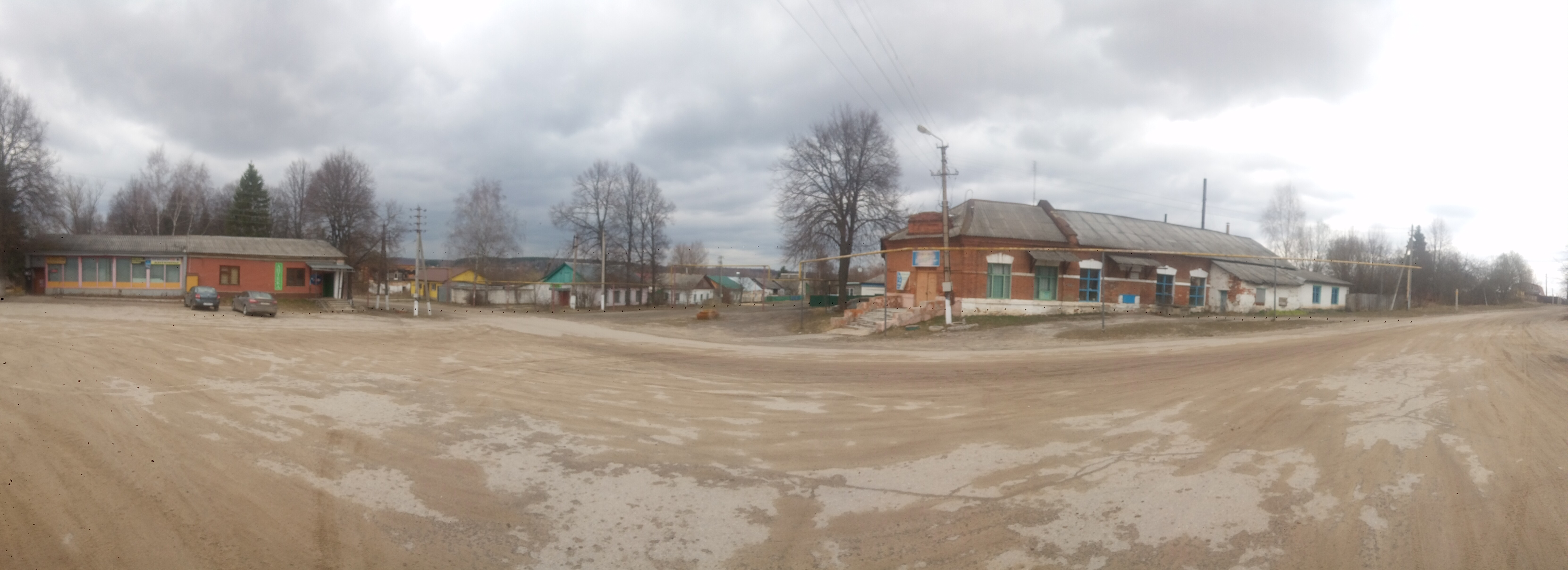 Ханино (Суворовский район)